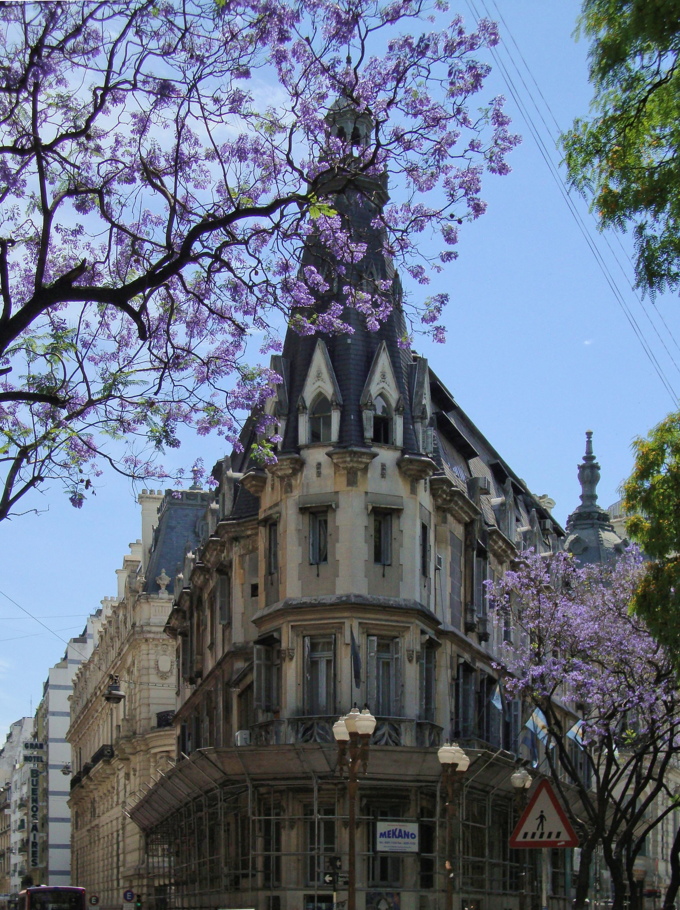 Palacio Haedo, actual sede de la Administración de Parques Nacionales. Residencia de la familia Haedo construida hacia 1870, remodelada luego al estilo neogótico. Buenos Aires, Argentina.